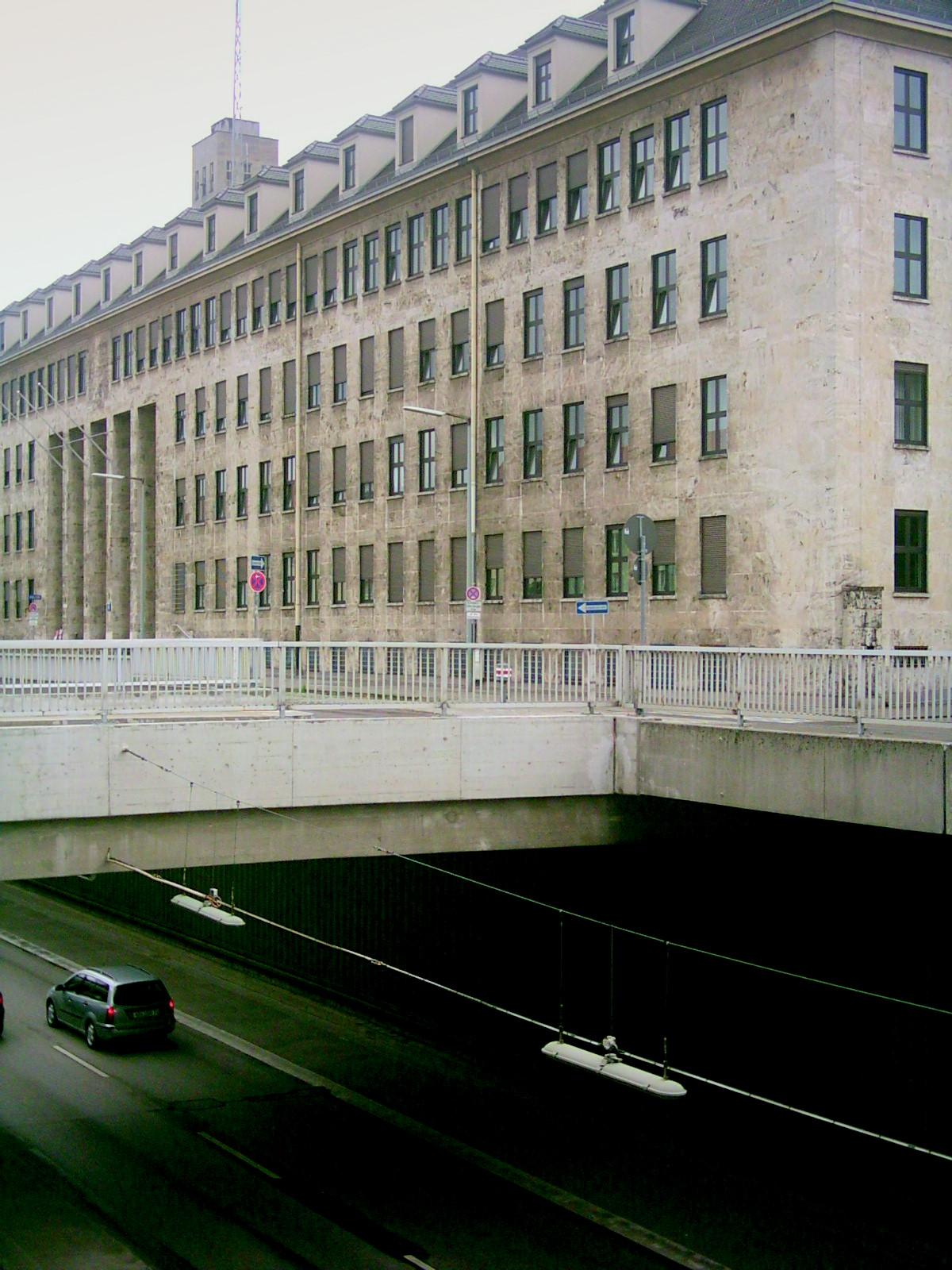 ehememalige McGraw-Kaserne München-Giesing / Reichszeugmeisterei über McGraw-Graben